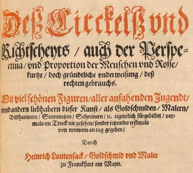 Ausschnitt aus dem Titelblatt des Buches von Heinrich Lautensack (1522–1568)